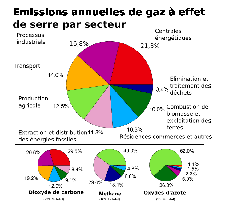 Emission de gaz à effet de serre